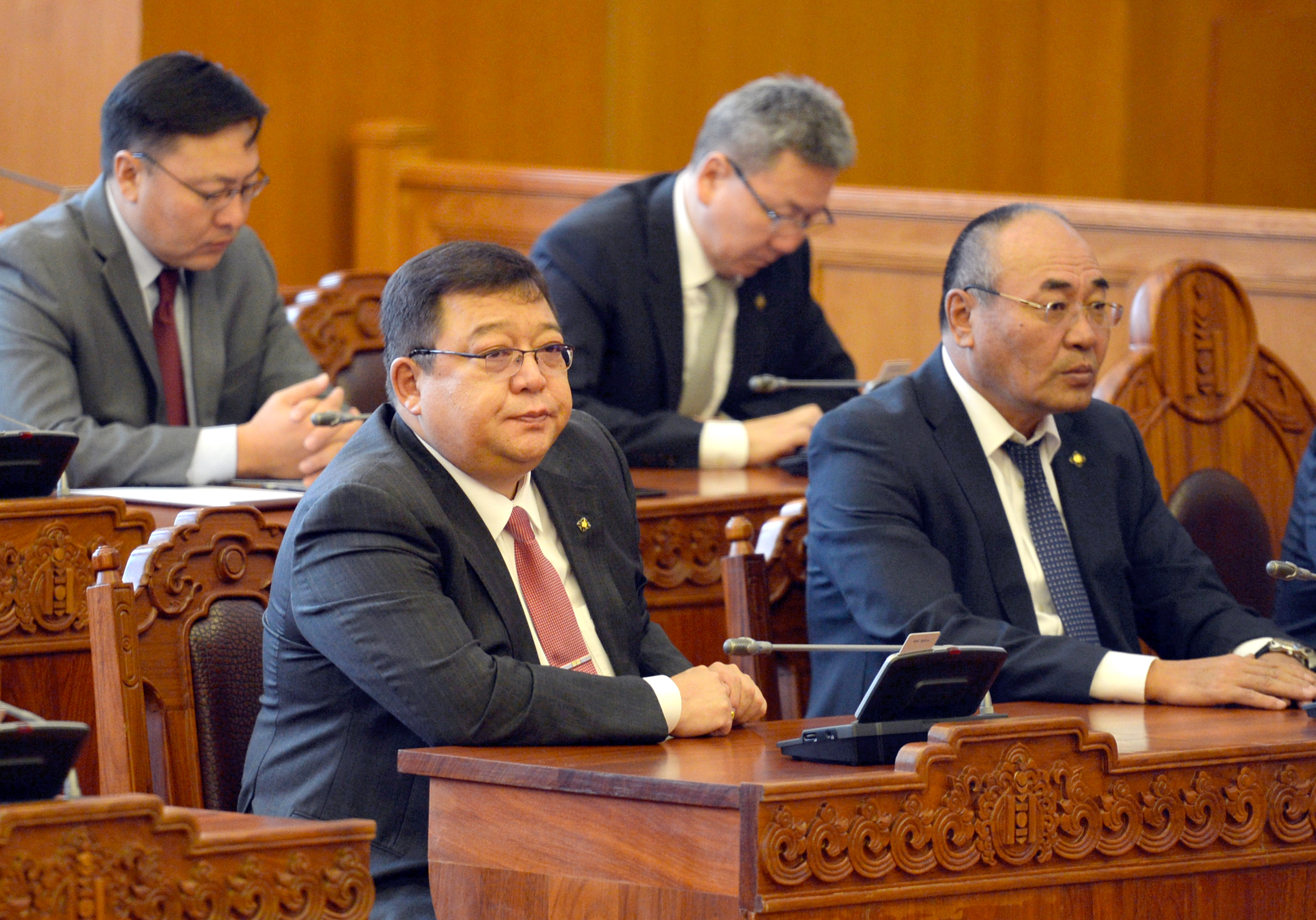 Монгол: УИХ-ын чуулганы танхим